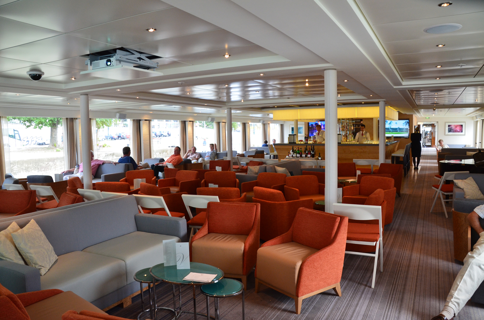 Die Lounge des Kabinenfahrgastschiffs Viking Embla